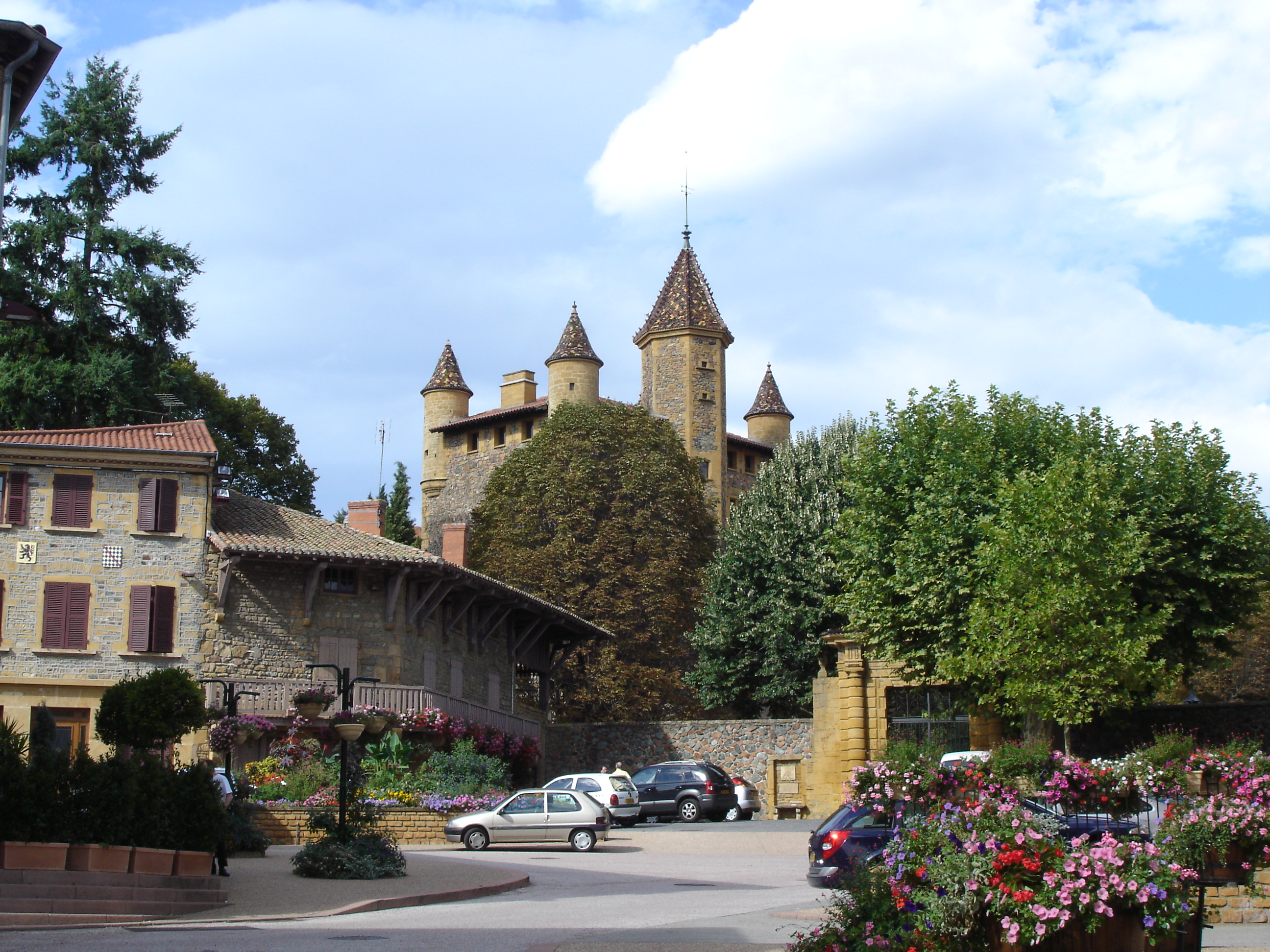 Place du château à Bully (Rhône - France)